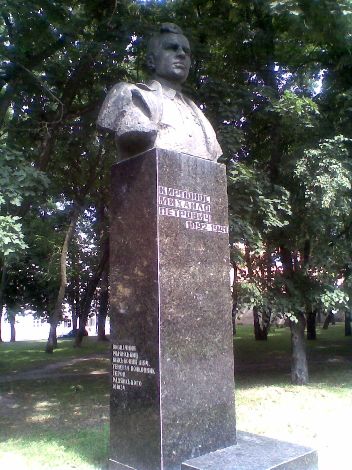 Памятник Кирпоносу Михаилу Петровичу в Чернигове.